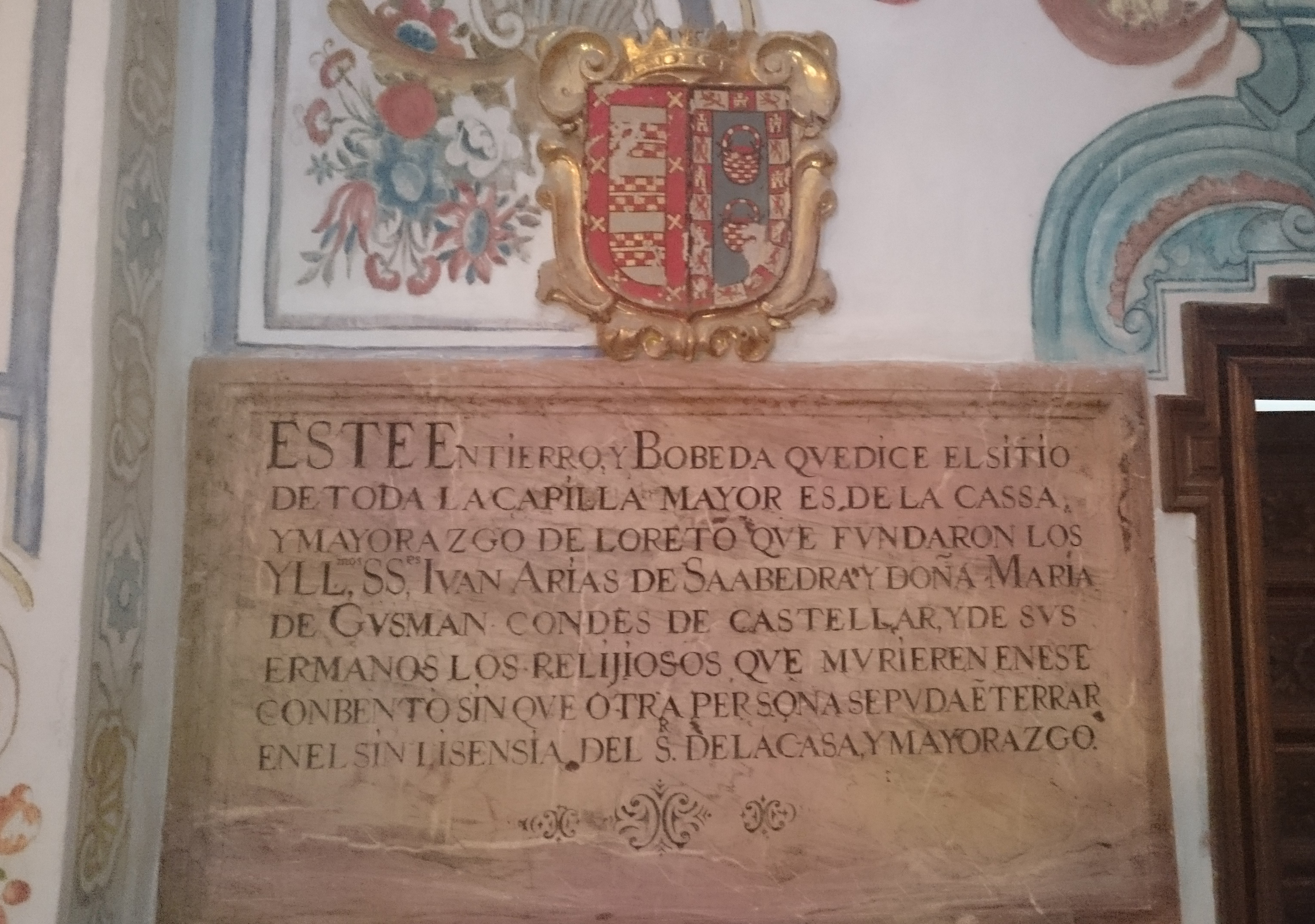 Inscripción de la Sacristía de Ntra. Sra. del Loreto en Espartinas, Sevilla, España, donde se recuerda la fundación del Convento y de la Cripta existente bajo la Sacristia por los Condes de Castellar en beneficio de su hijo el I Señor del Moscoso y sus descendientes, ademas de para los miembros de la comunidad franciscana